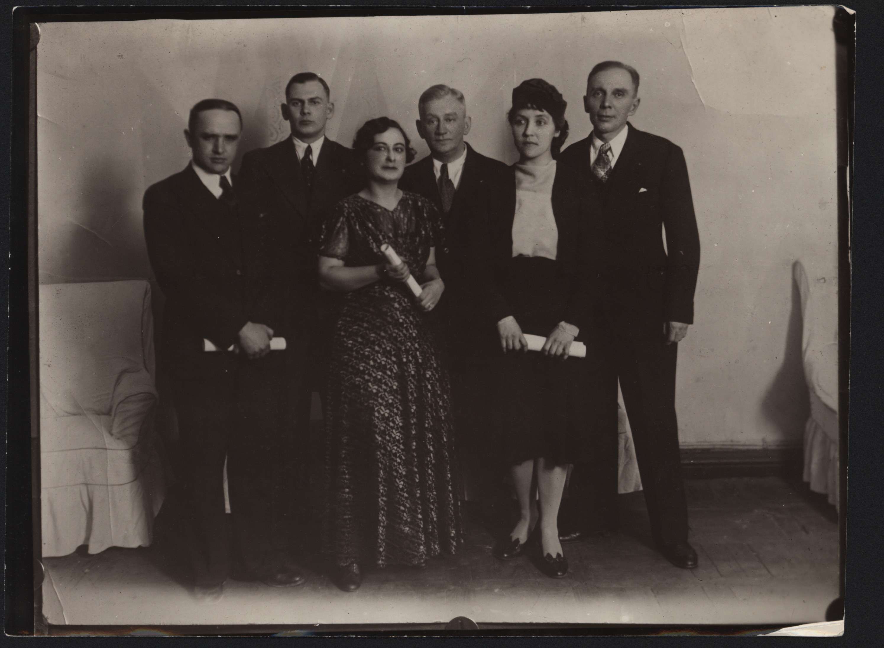 Поэты-харбинцы. Слева направо: В.К.Обухов, М.А.Шмейсер, Н.Ильнек, А.И.Несмелов, А.Андреева,А.А.Ачаир. 1930-ые Фотография ГА РФ.Ф.Р-10247.Д.180